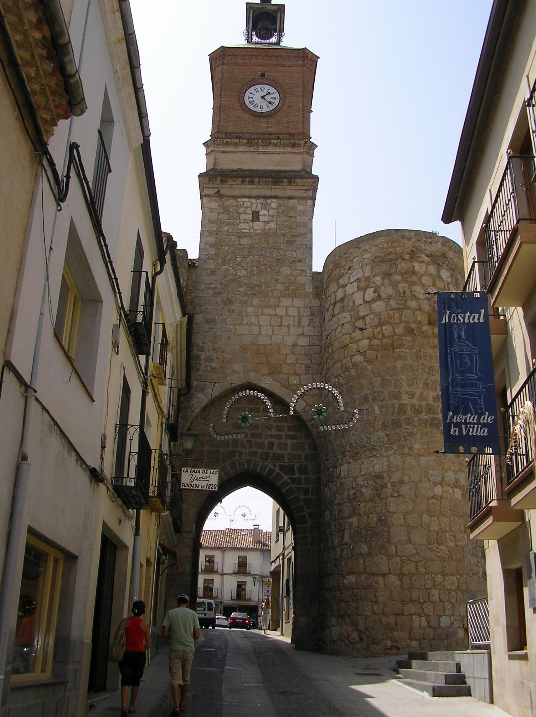 Puerta de la Villa, Almazán, Soria, España/Spain